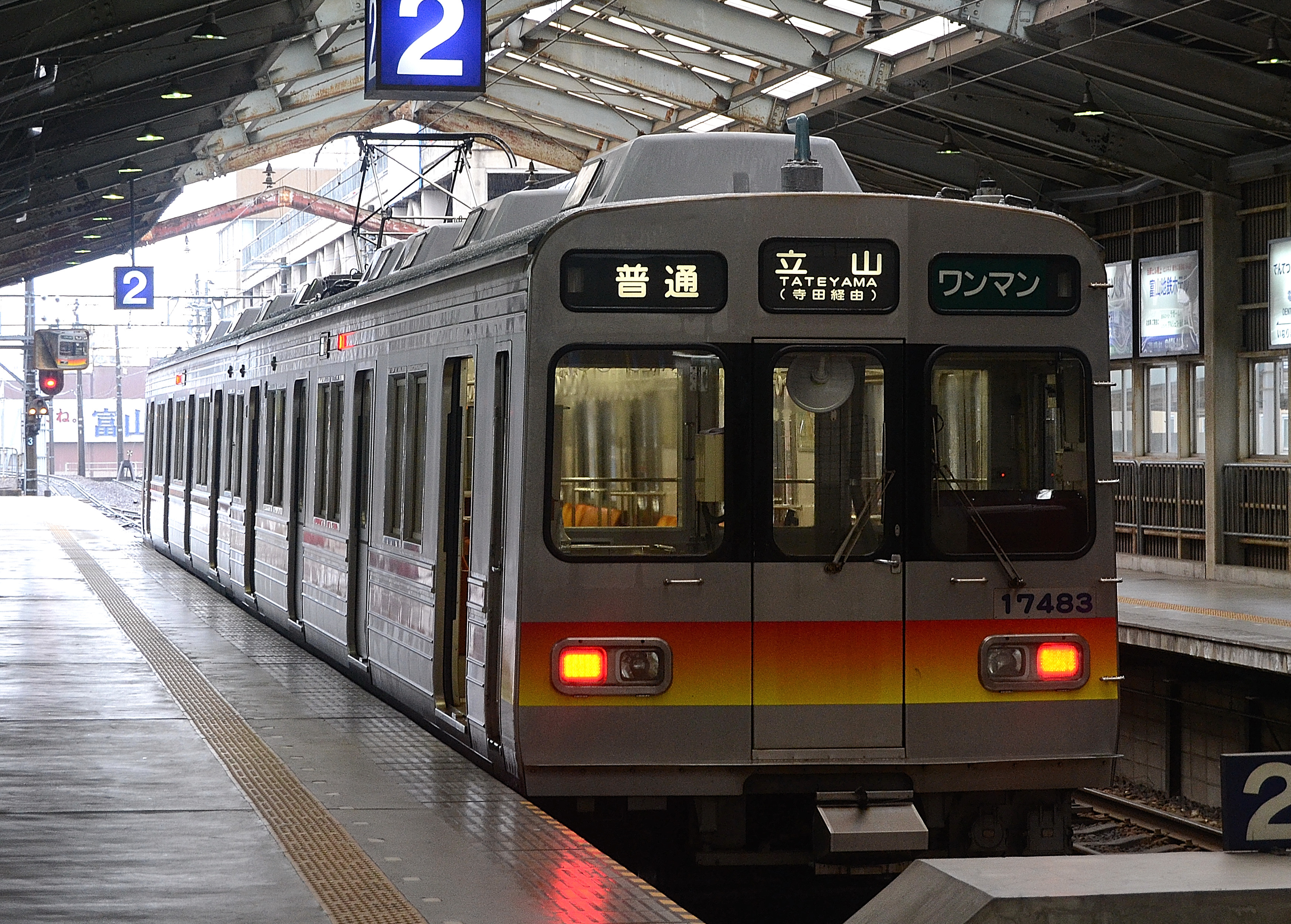 富山地方鉄道、電鉄富山駅に停車中の17480形